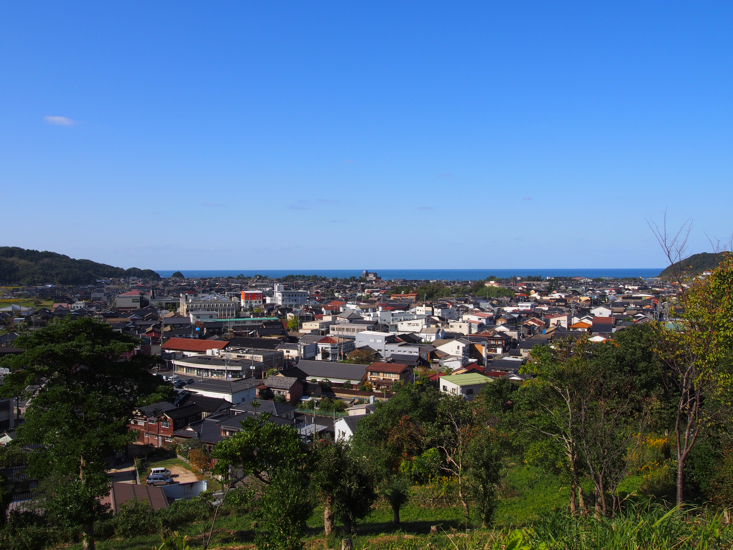 網野銚子山古墳後円部から見た京都府京丹後市網野町網野の風景。奥は日本海。